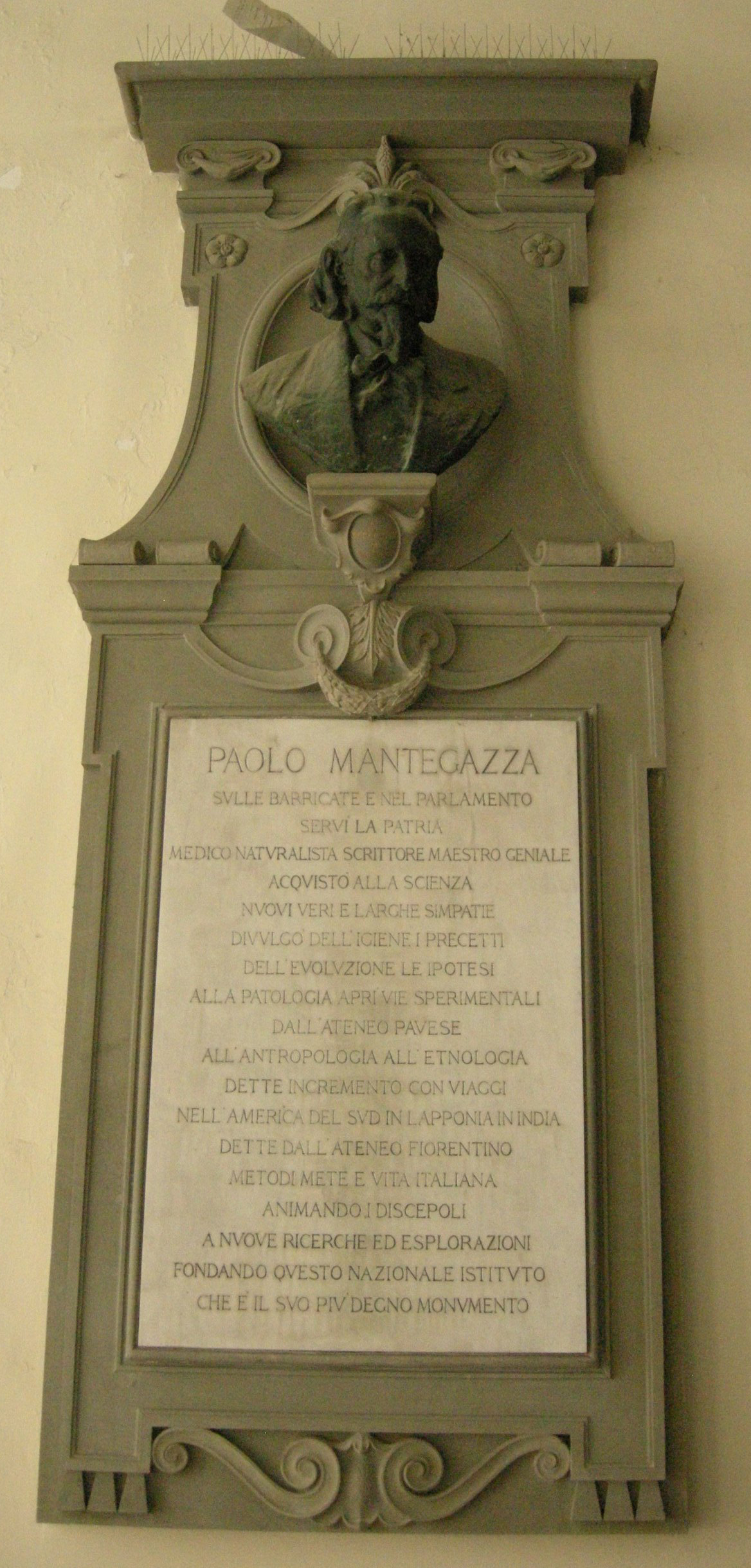 Palazzo Nonfinito, targa Paolo Mantegazza. PAOLO MANTEGAZZA Sulle barricate e nel Parlamento Servì la Patria Medico naturalista scrittore maestro geniale Acquistò alla scienza Nuovi veri e larghe simpatie Divulgò dell’igiene i precetti Dell’evoluzione le ipotesi Alla patologia aprì vie sperimentali Dall’ateneo pavese All’antropologia all’etnologia Dette incremento con viaggi Nell’America del Sud in Lapponia in India Dette dall’atenaeo fiorentino Metodi mete e vita italiana Animando i discepoli A nuove ricerche ed esplorazioni Fondando questo nazionale istituto Che è il suo più degno monumento.